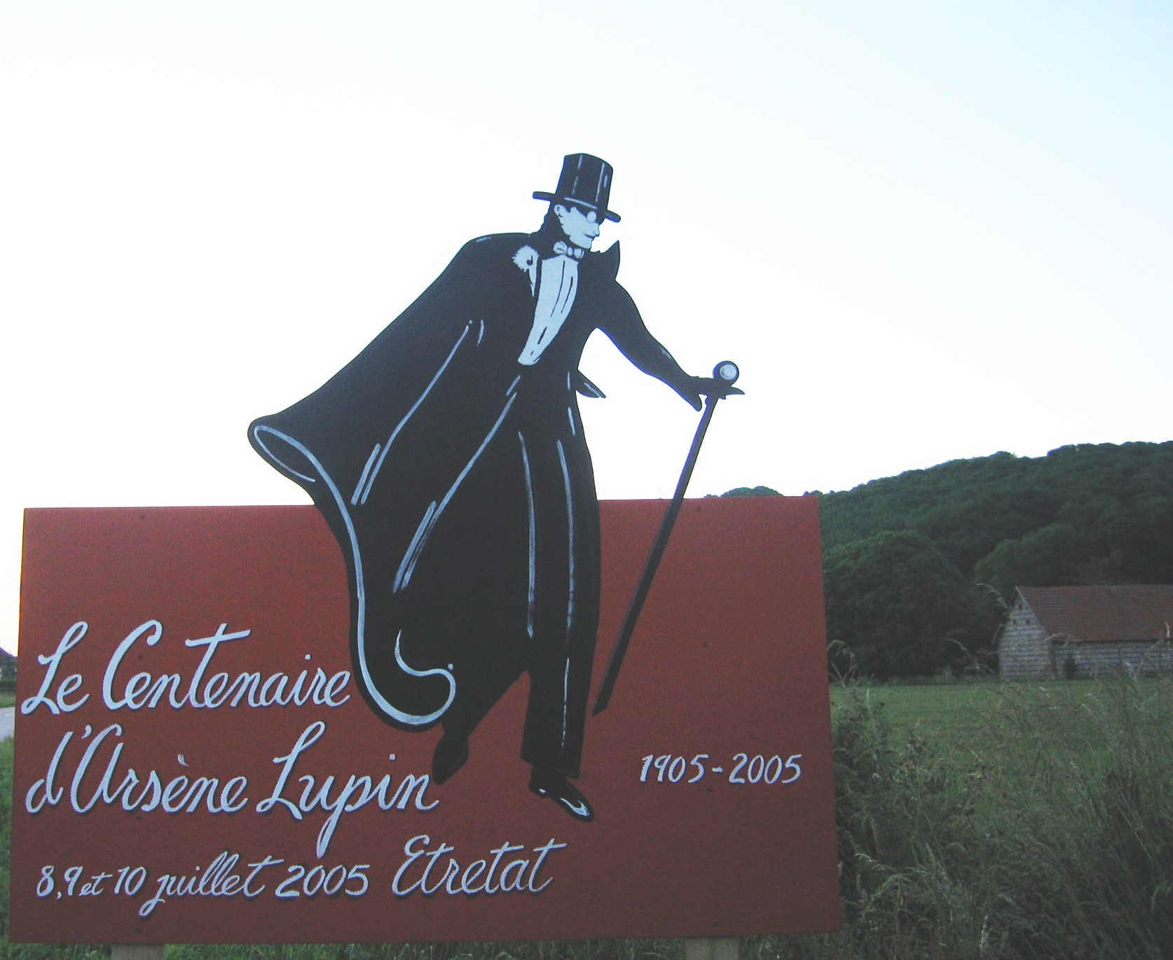 Centenaire d'Arsène Lupin en juillet 2005 à Etretat. Pancartes placées aux entrées de la ville, dessinées par Catherine Barray. Licensing photo Samy 2005